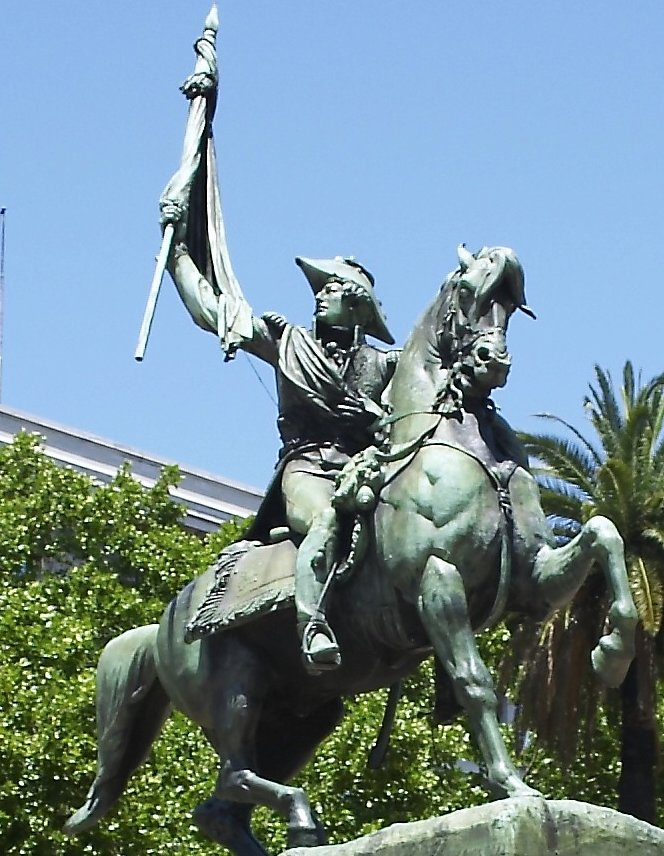 Estatua ecuestre de Manuel Belgrano en la Plaza de Mayo, Buenos Aires, Argentina. Este monumento se inauguró el 24 de septiembre de 1873 en el centro de la Plaza del Fuerte (actual parte Este de la plaza) mirando hacia el Oeste. En 1886 fue trasladada a su actual emplazamiento frente a la Casa Rosada mirando al Norte.